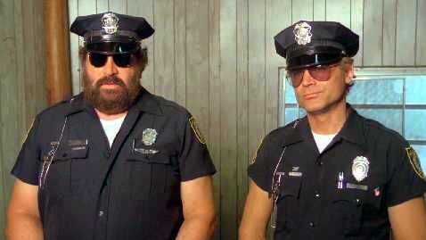 Képkocka a Szuperhekusok című filmből (Miami Supercops - I poliziotti dell'ottava strada)